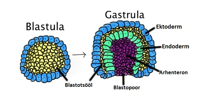 Gastrulatsioon toimub siis, kui ühekihiline blastula voltub sissepoole, suureneb ja moodustub gastrula. Värvikood: ektoderm - sinine; endoderm - roheline; blastotsööl - kollane; arhenteron - lilla.